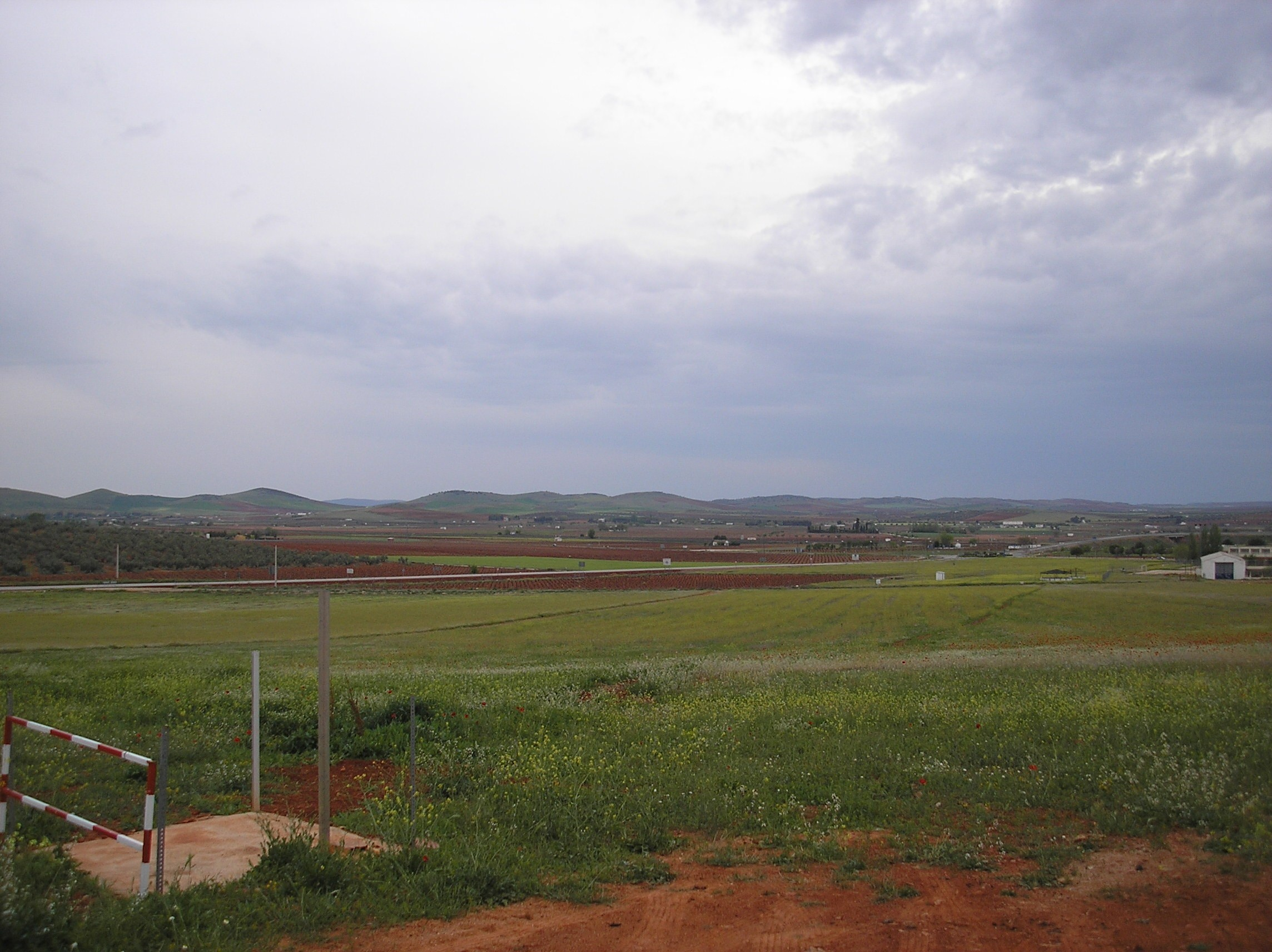 taken by Valdoria